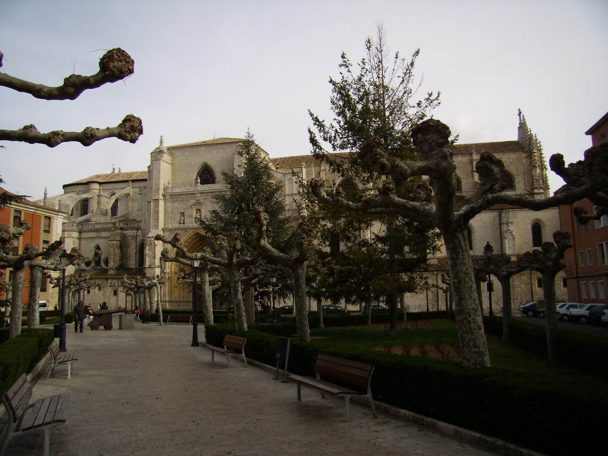 Catedral de Palencia desde la Plaza de Cervantes